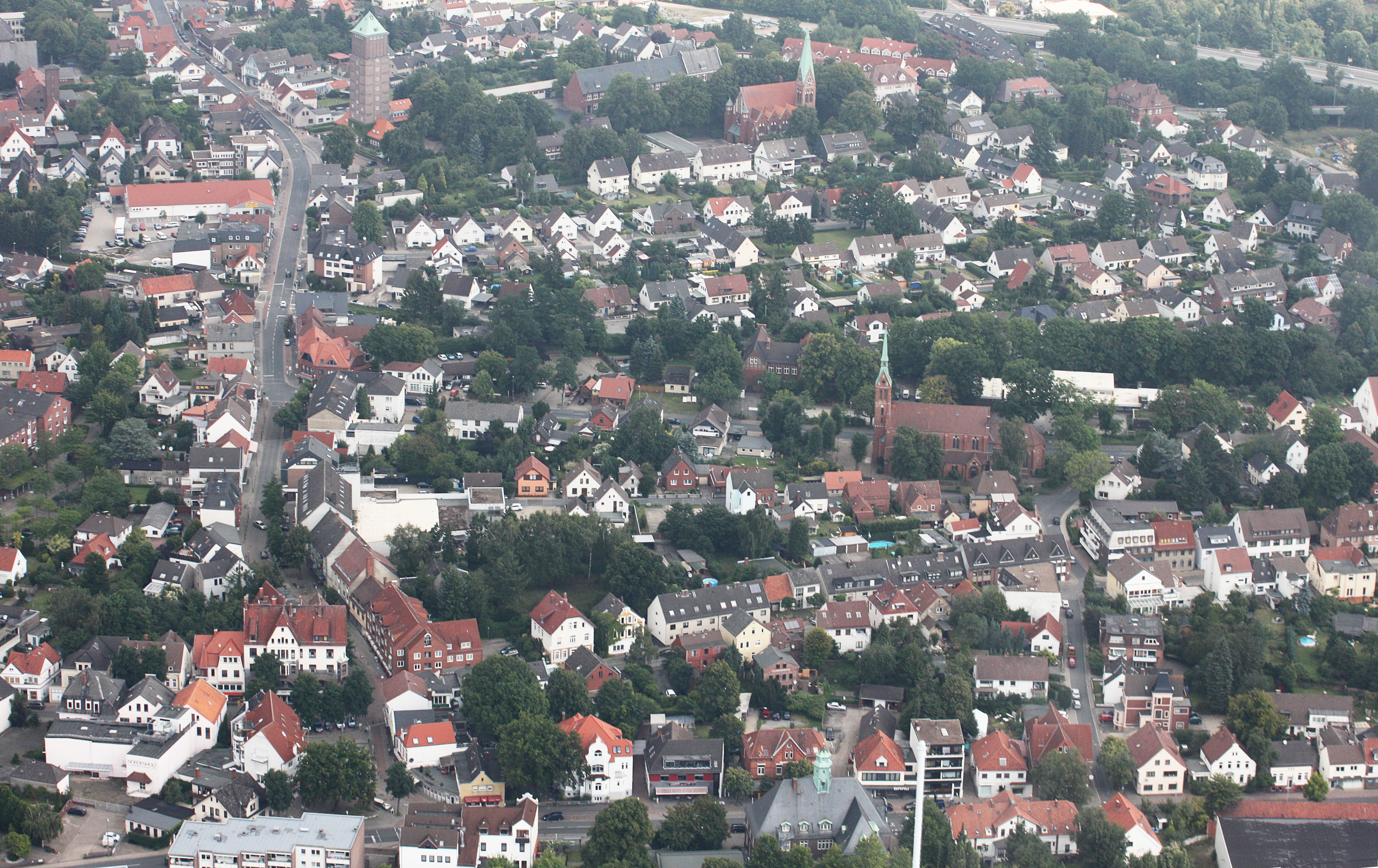 Fotoflug Bremen; Flughöhe 500 m; Luftbilder Bremen-Nord: vom U-Boot Bunker Valentin bis Vegesack ; Flug entlang der Weser von West nach Ost, über dem linken Weserufer, mit Blickrichtung zum rechten Weserufer